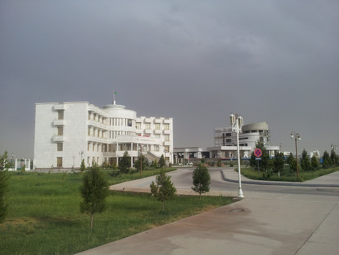 Новые здания по проспекту "Bitarap Txrkmenistan"